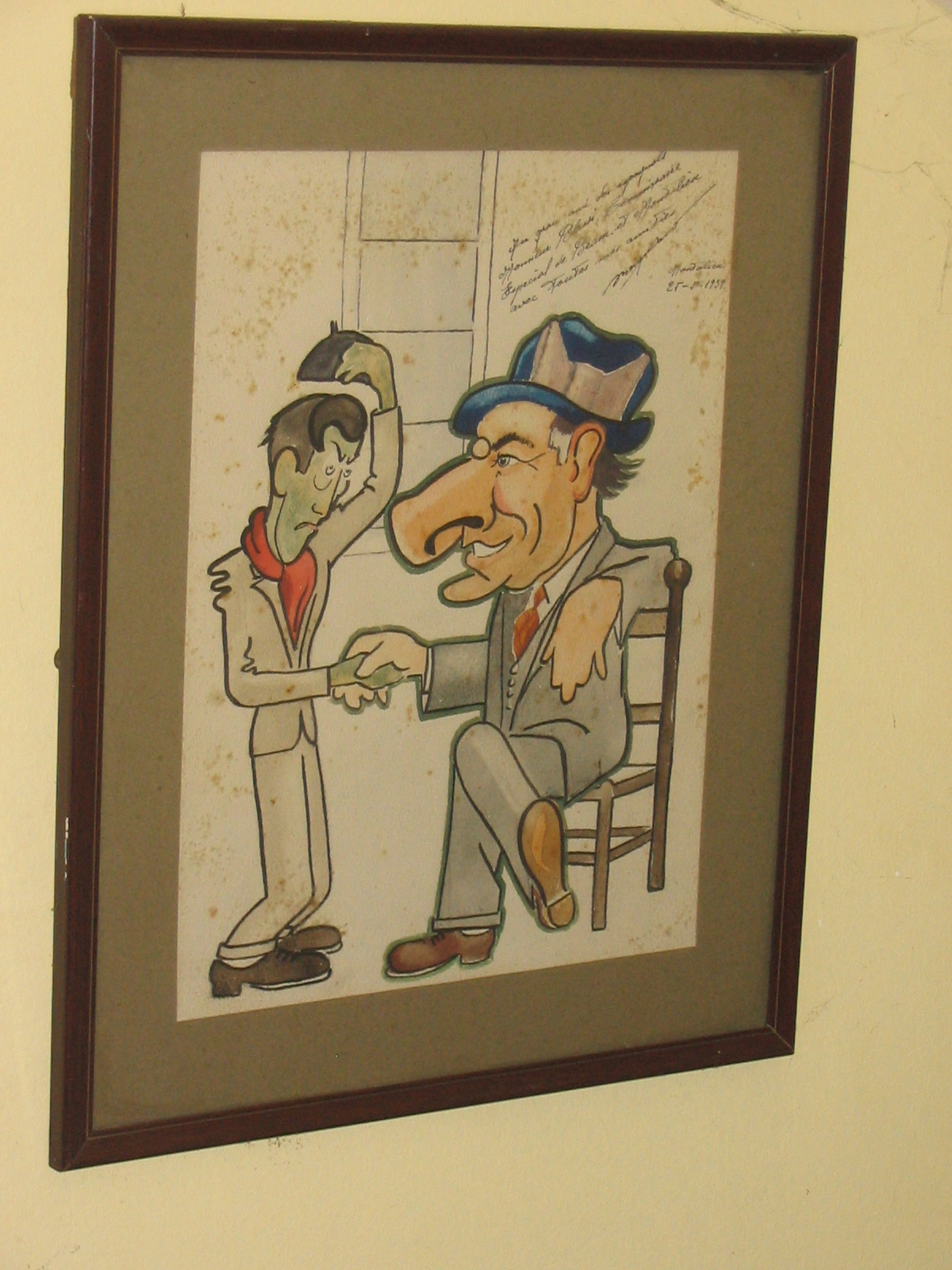 Louis Blasi par un refugie espagnol